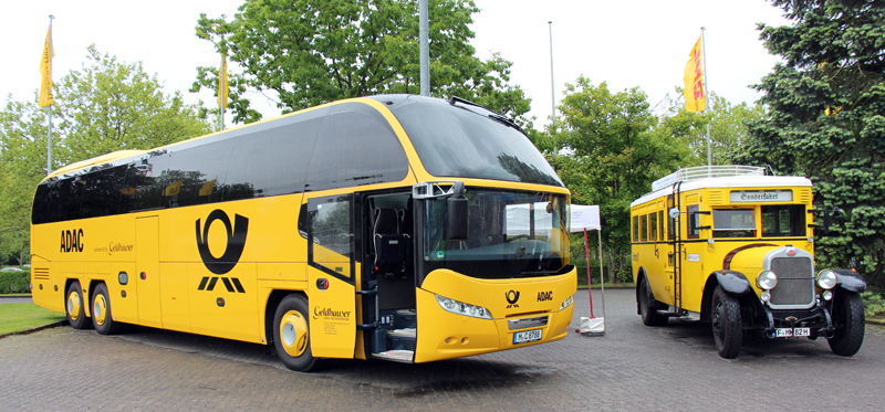 Neuer ADAC-Postbus (2013) links neben einem Kraftpost von 1925. Aufnahme entstand vor der Jahrhunderthalle in Frankfurt am Main, dort hielt die Deutsche Post AG ihre Hauptversammlung 2013 ab.